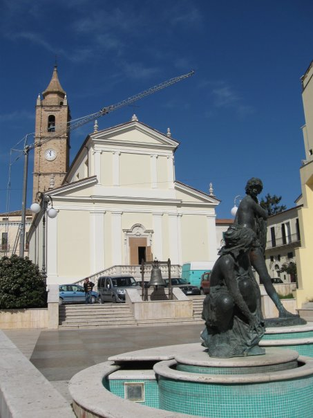 Nereto (Teramo): Chiesa Madre o di Maria Santissima della Consolazione.